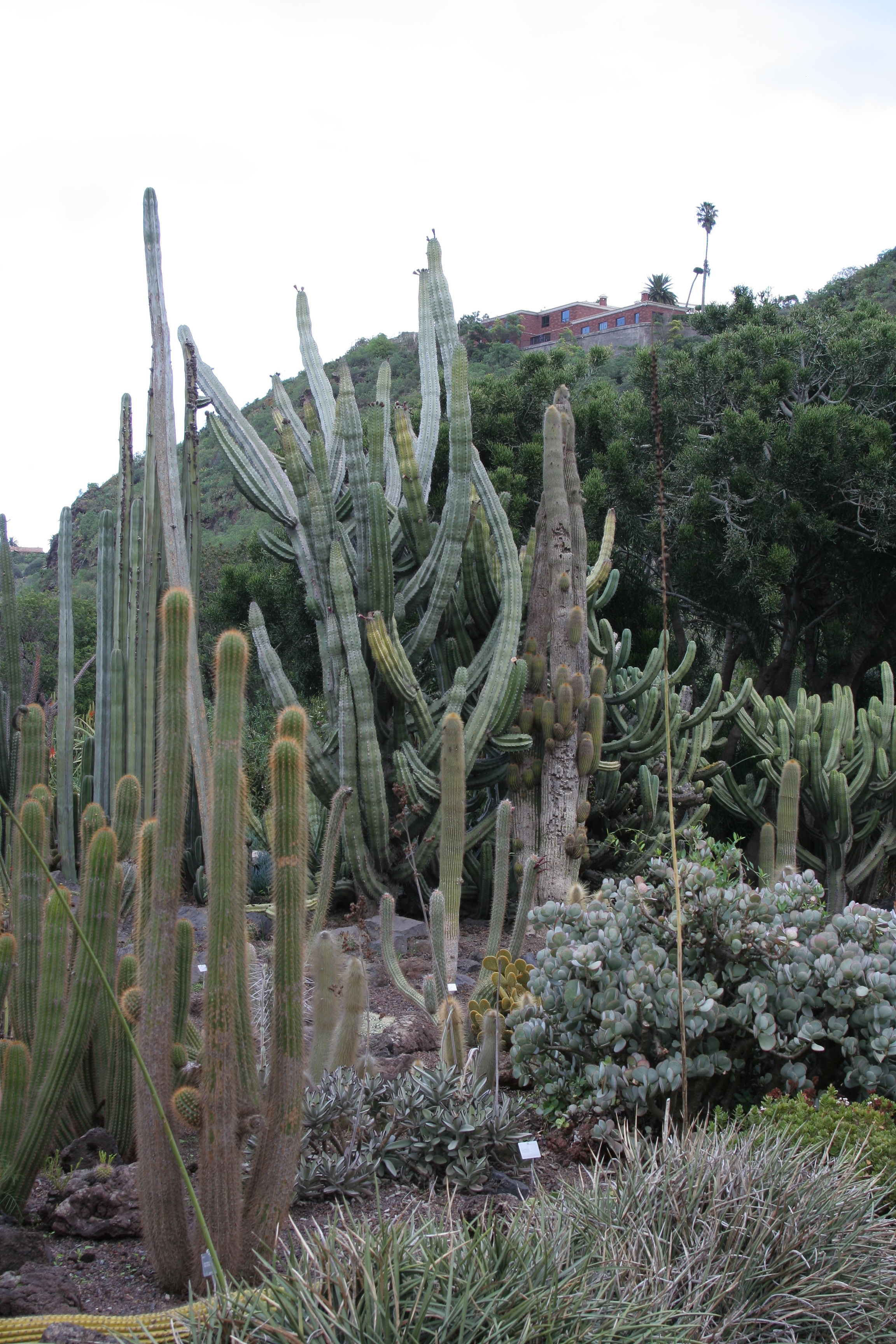 Aufgenommen in 2006